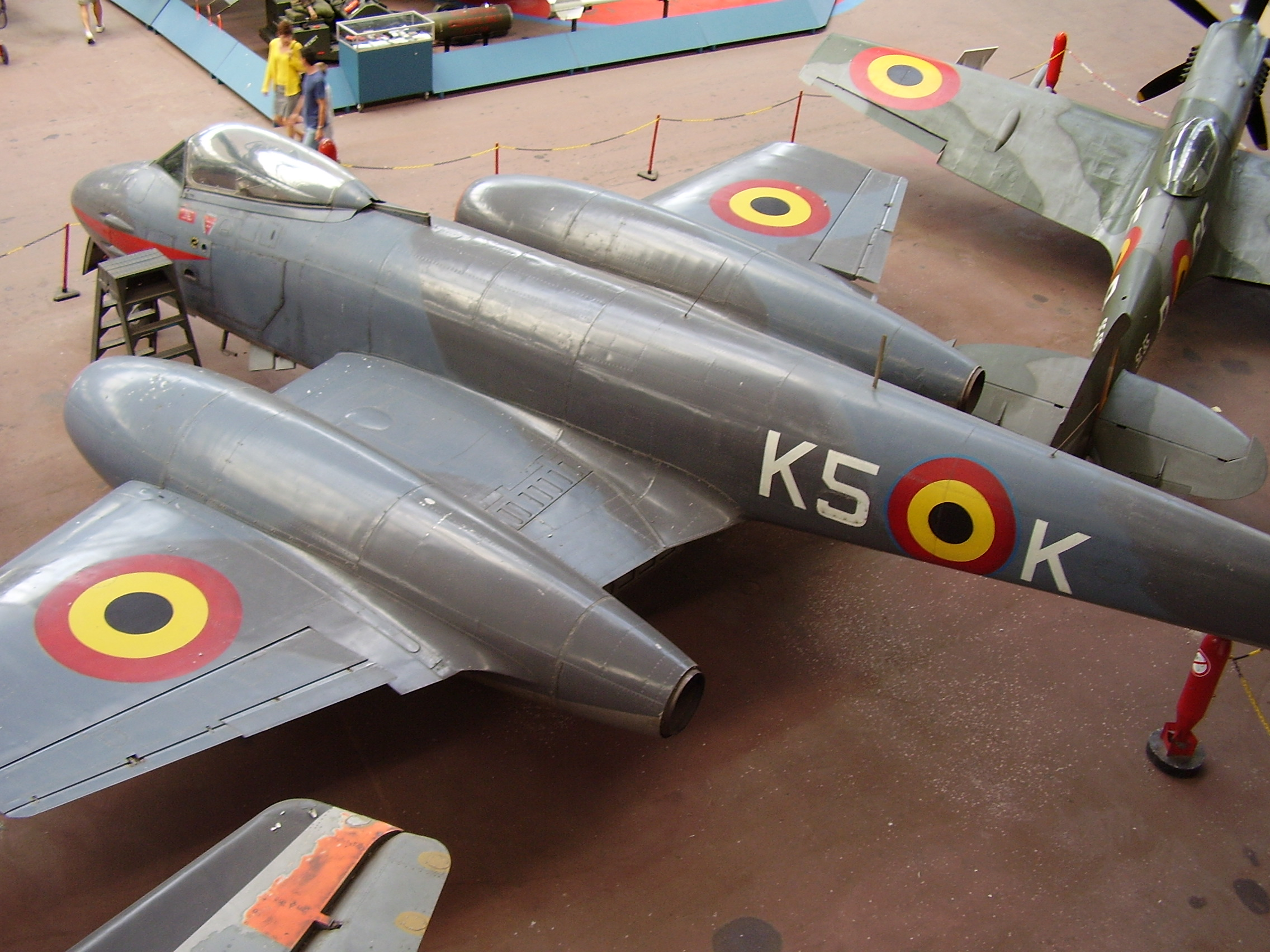 Royal Military Museum Brussels, Musée Royal de l'Armée, Koninklijk Museum van het Leger en de Krijgsgeschiedenis